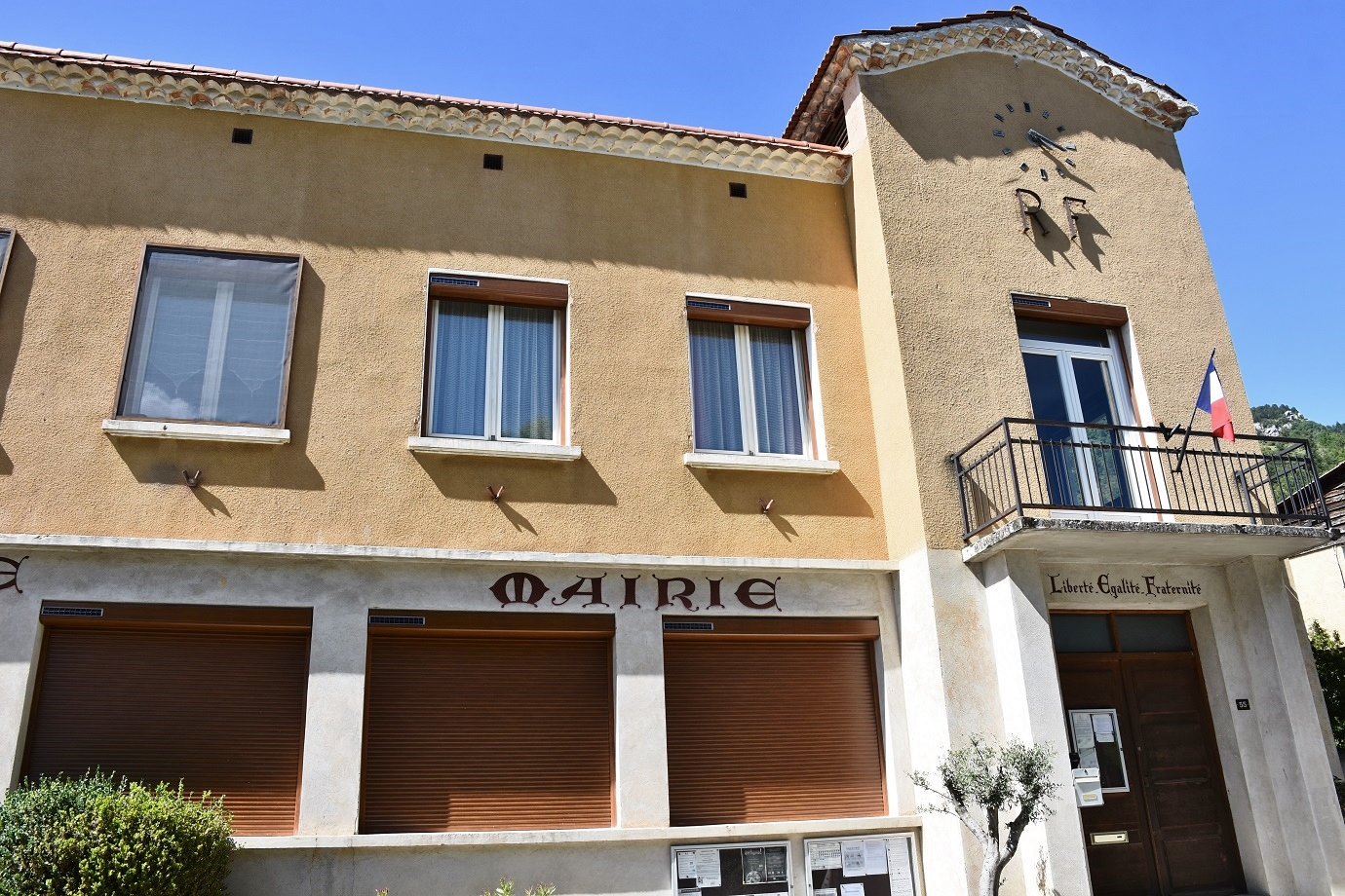 département de la Drôme